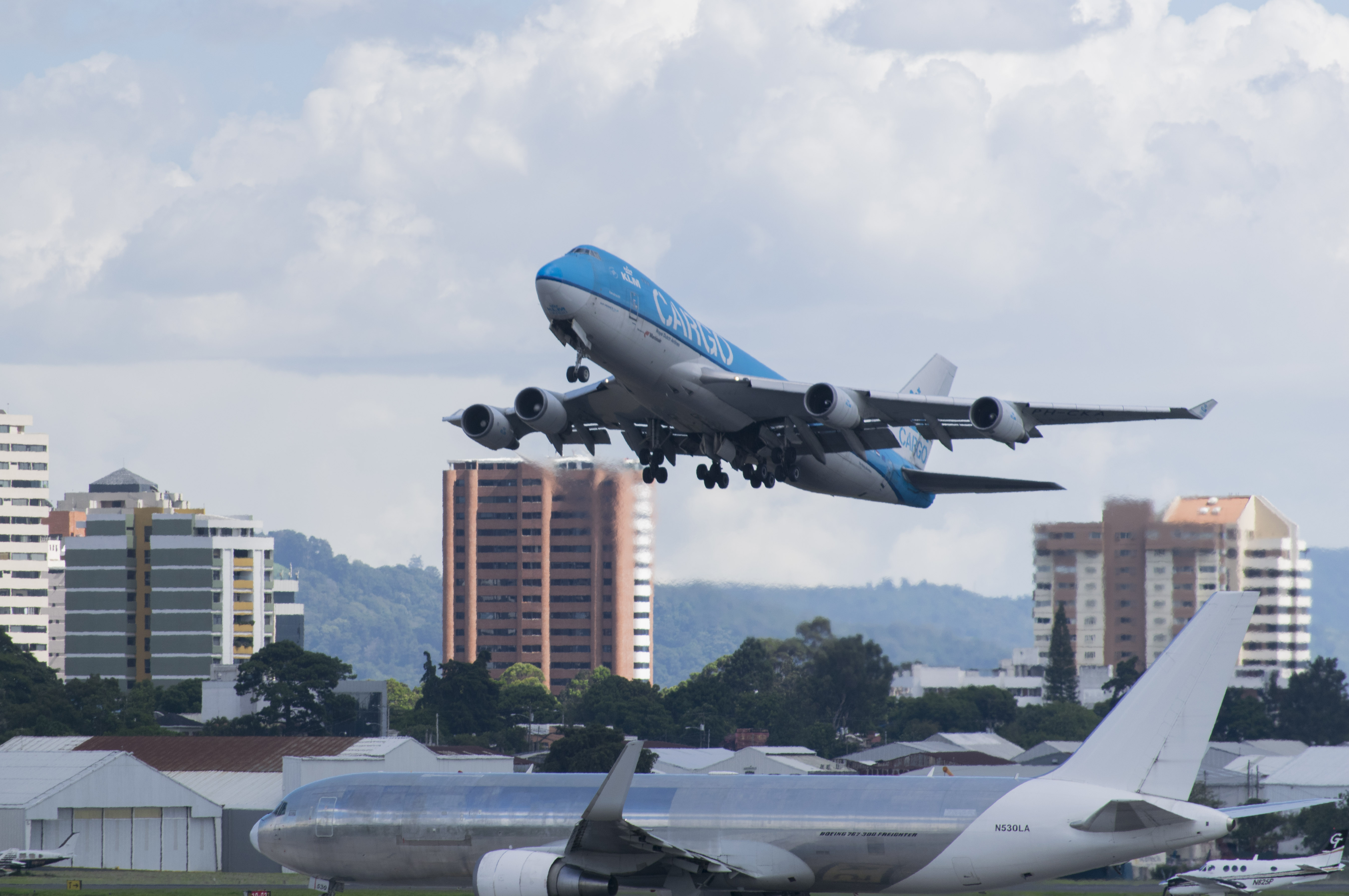 Dos aviones cargueros en la aurora